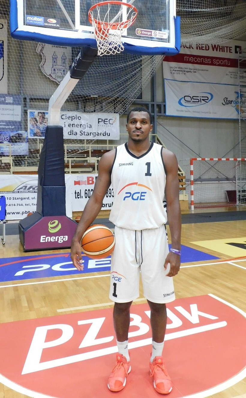 Raymond Cowels - PGE Spójnia Stargard